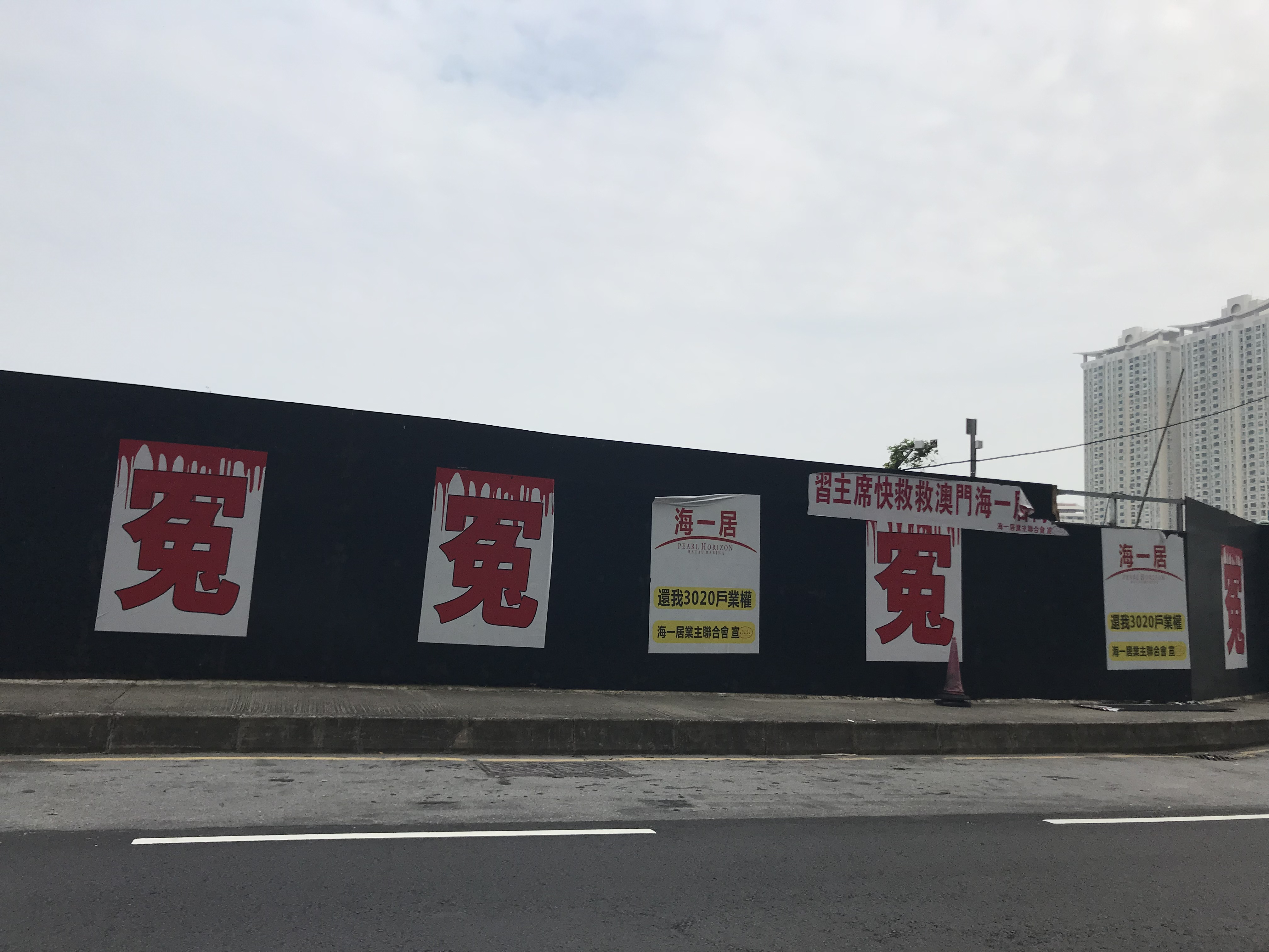 中文（台灣）: 海一居地盤外牆的標語1